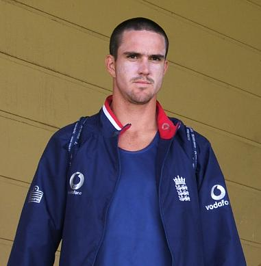 Kevin Pietersen after training at Adelaide Oval